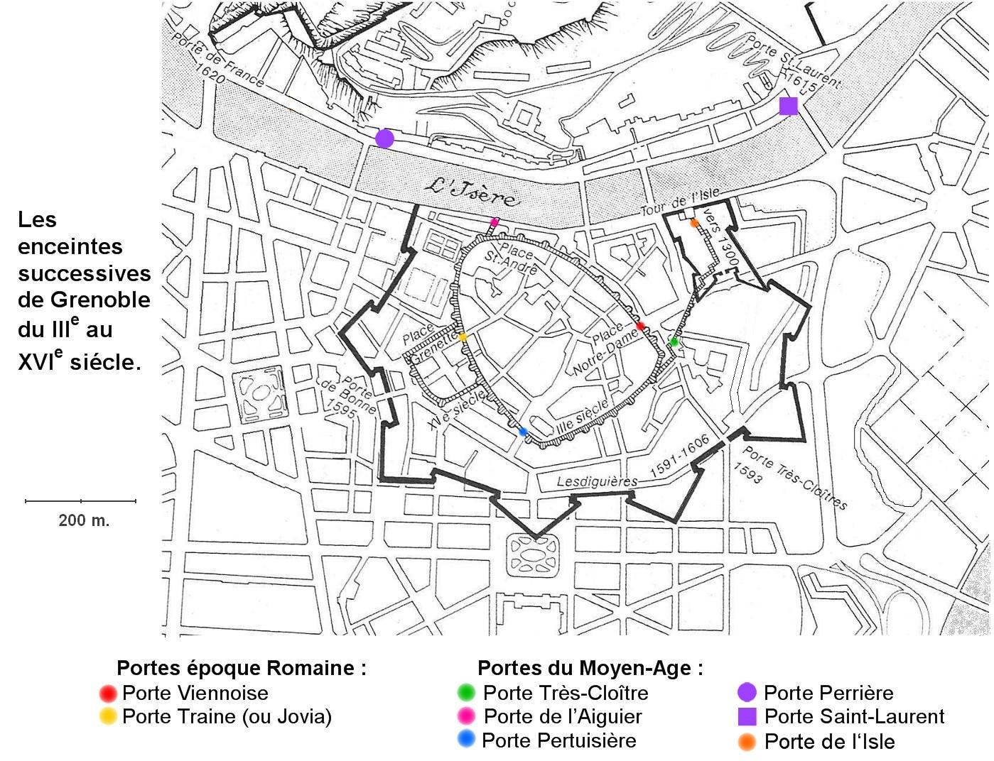 Positionnement des différentes enceintes de Grenoble, du IIIe au XVIe siècle (Lesdiguières) avec les portes.